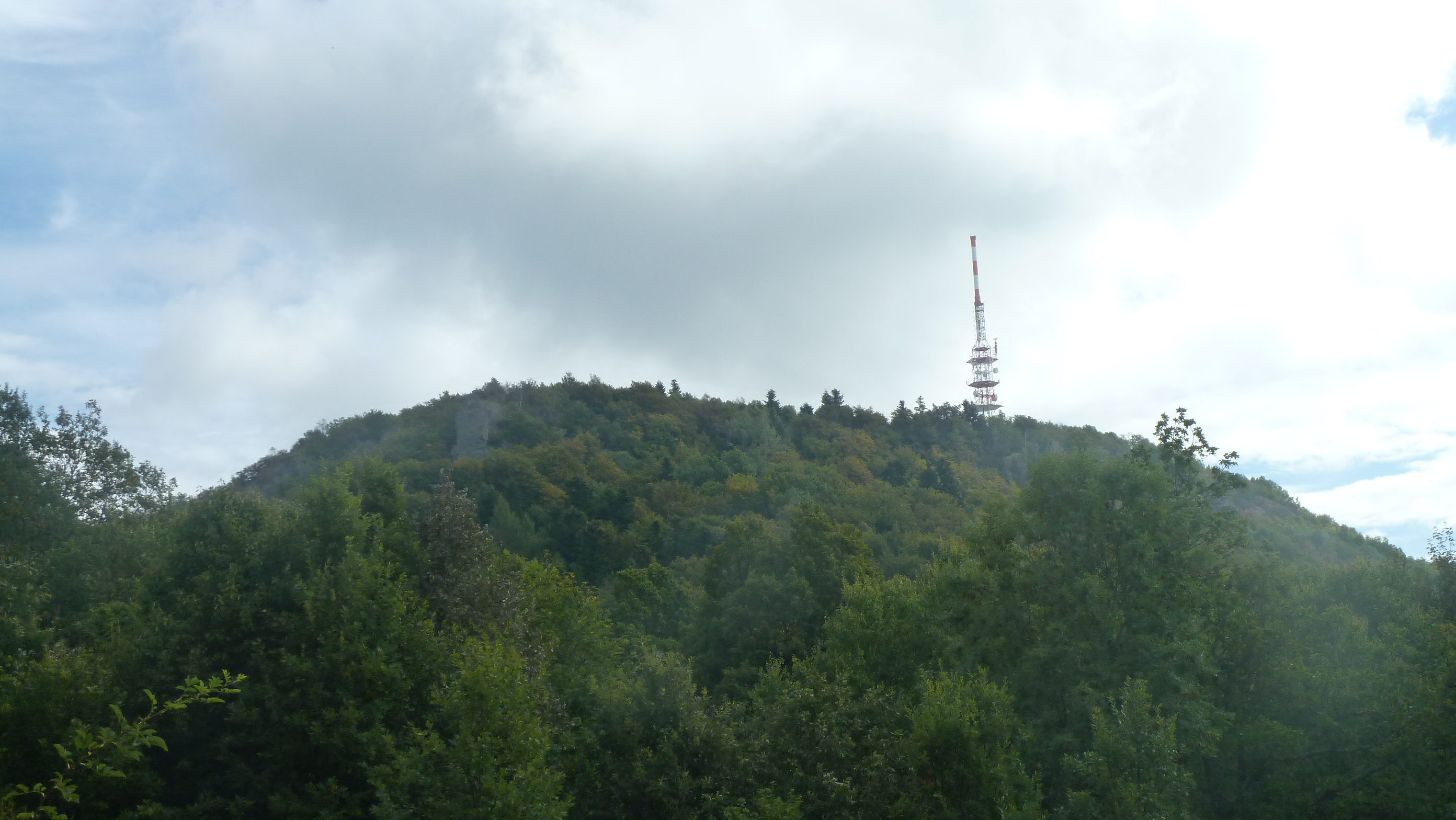 Poľad na vrchol Sitna z Tatárskej lúky